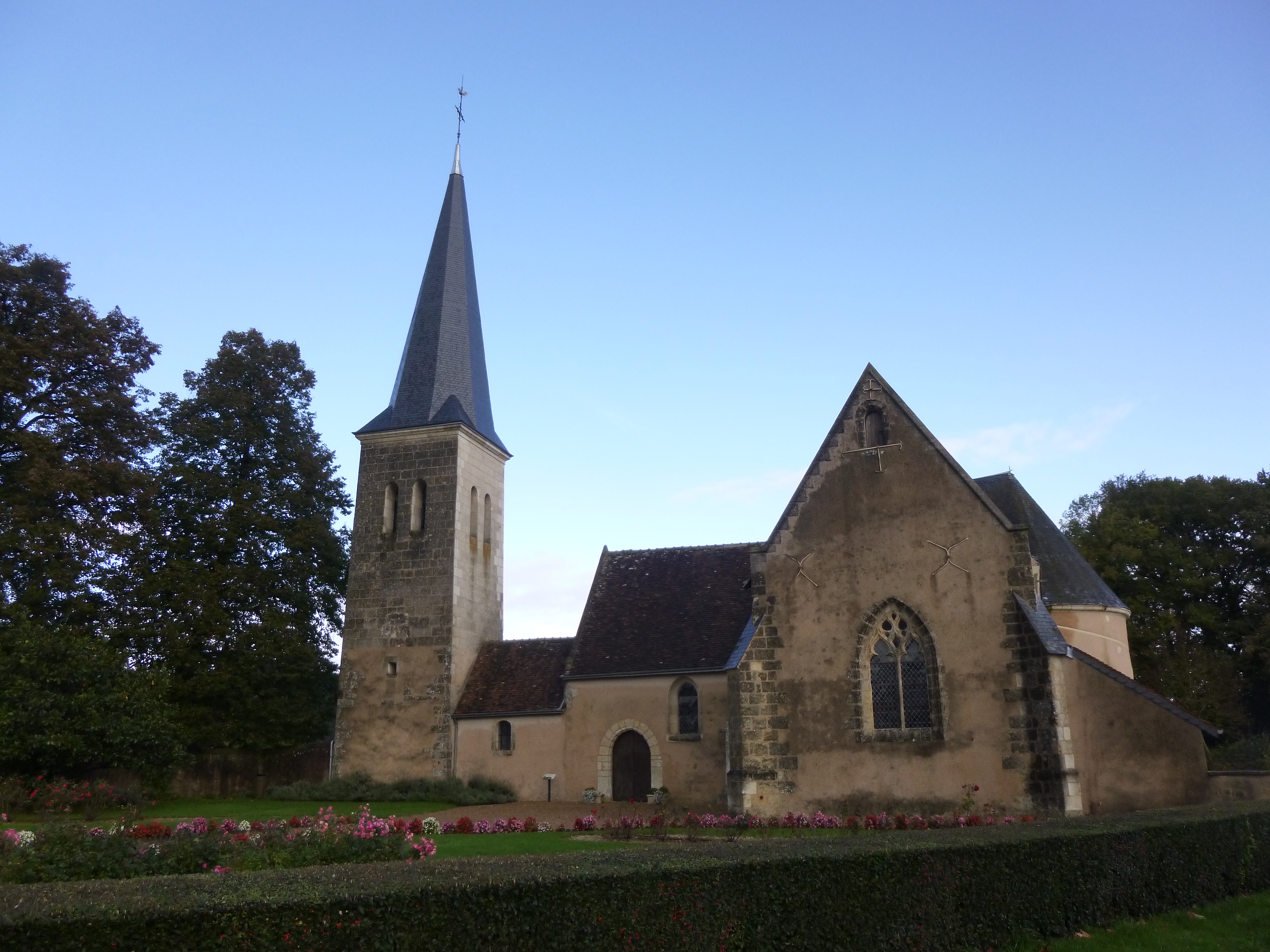 Eglise Saint-Léonard des Hayes